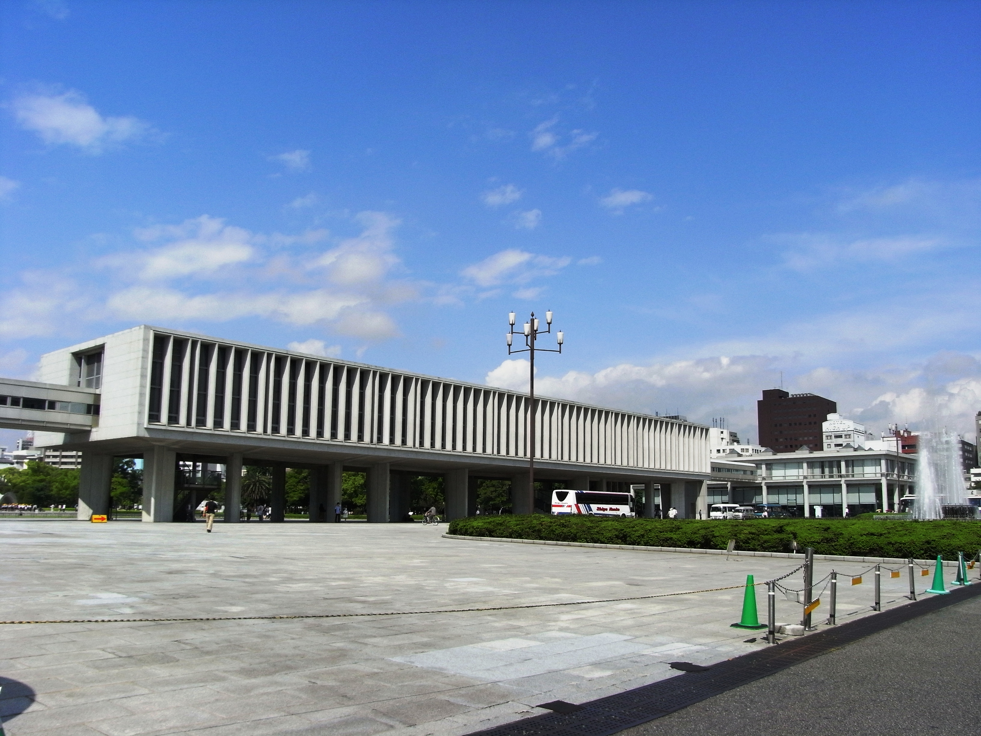 Hiroshima Peace Memorial Museum(広島平和記念資料館)